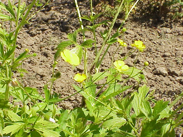 Species: Ranunculus auricomus Family: Ranunculaceae Image No. 2